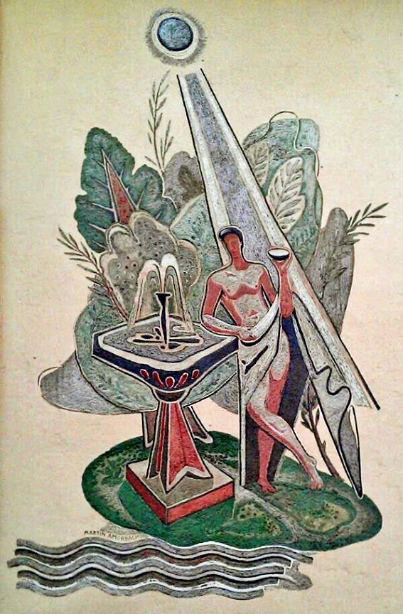 Wandgemälde von Oskar Martin-Amorbach an der DRV-Frankenklinik (gebaut 1954) in Bad Kissingen, Menzelstraße.